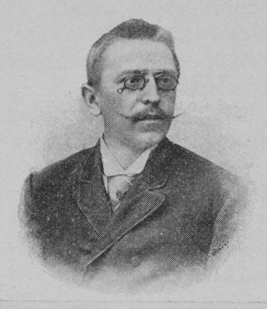 Portrait of František Serafínský Procházka (1861 - 1939), Czech poet.